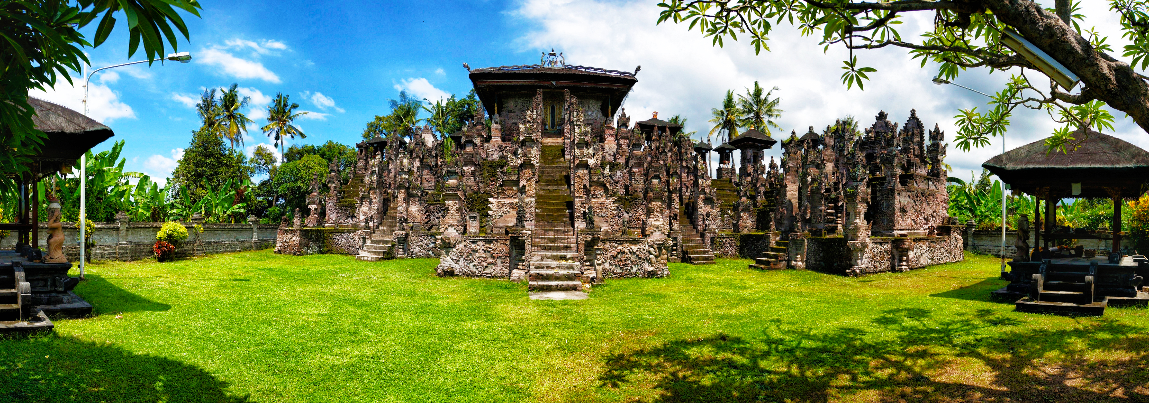 Pura Beji Sangsit